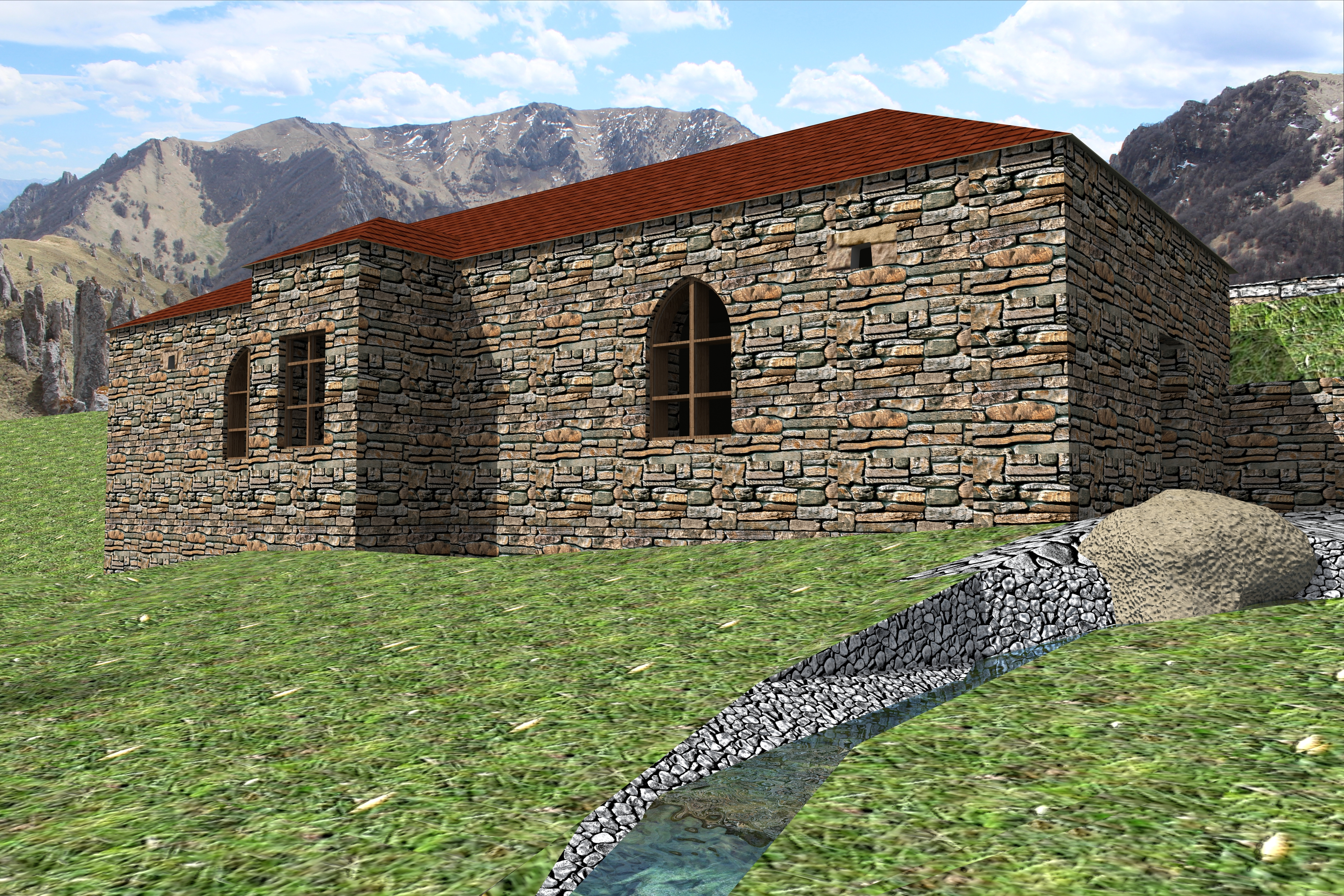 Предполагаемый вид Мечети в селении Моцкарой в исторической области Нашха.